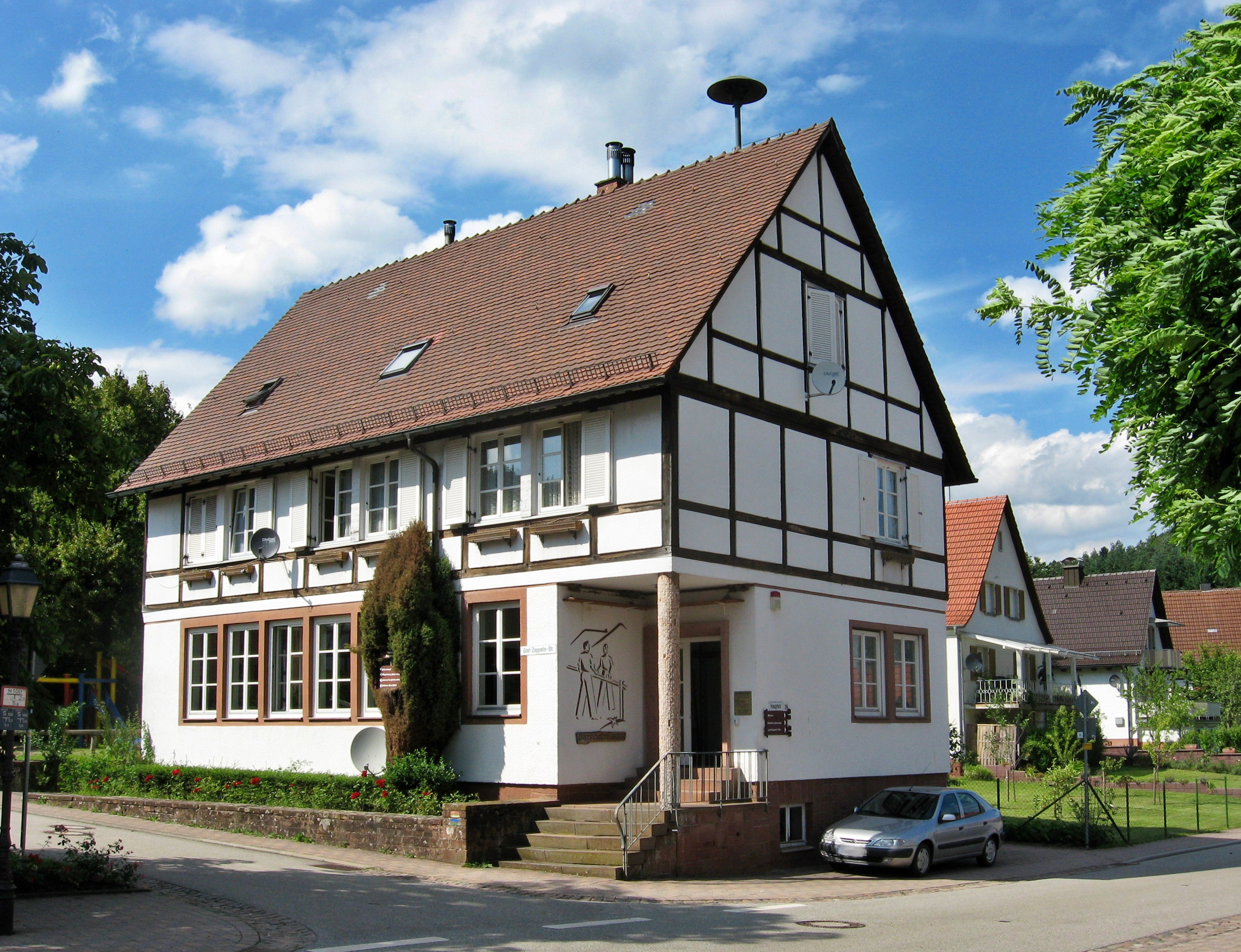 Hauptstraße 20 in Nothweiler, Ehemaliges Gemeindehaus